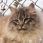 Barin jeune chat sibérien néva-masquerade de couleur seal silver tabby point.